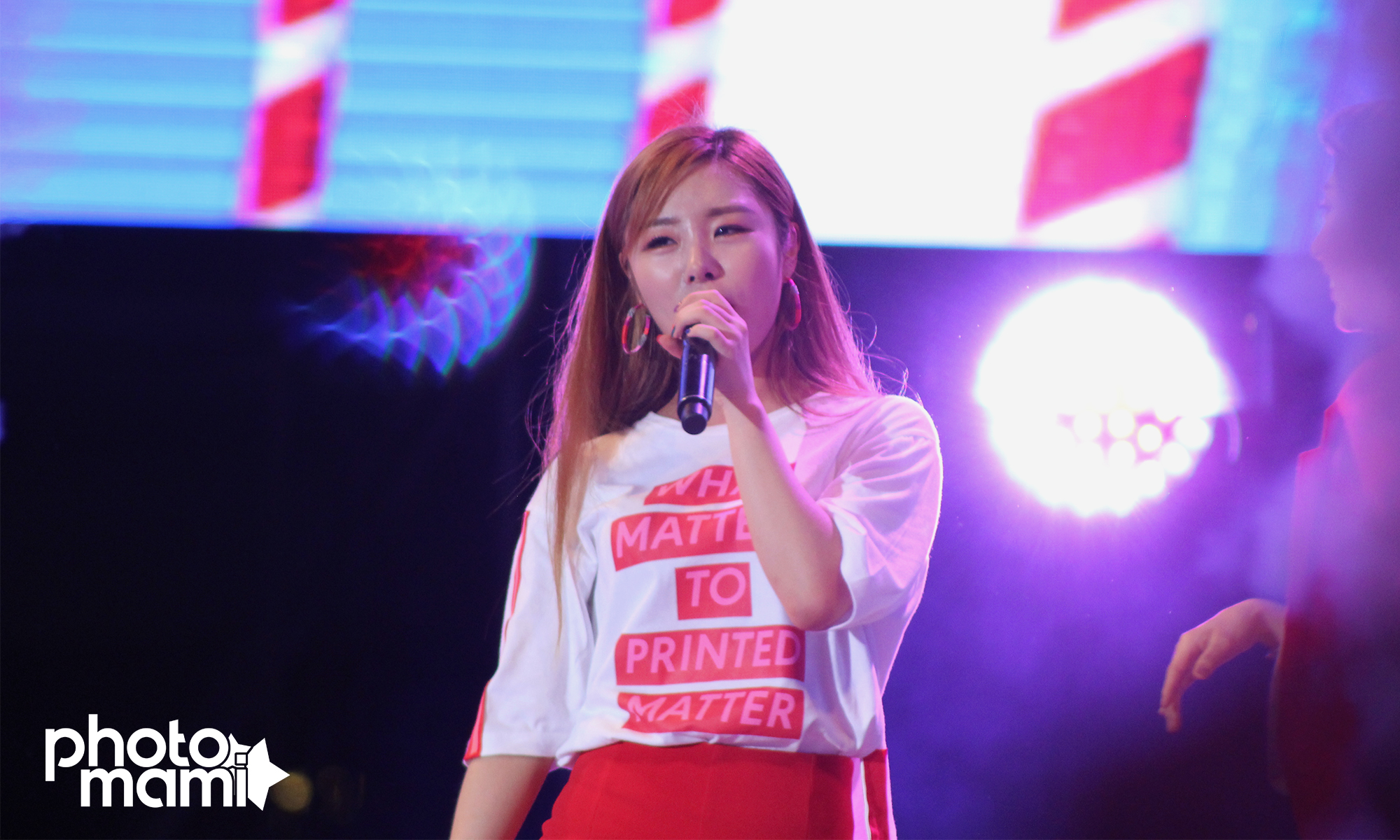 170719 대구치맥페스티벌